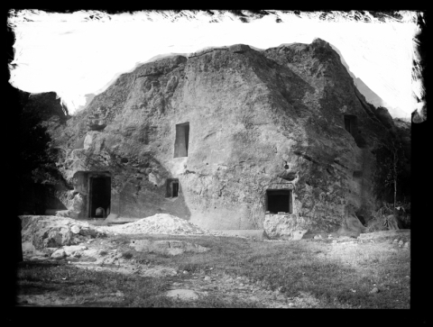 Casa de Piedra. Alcolea del Pinar. [Guadalajara] Fondo Fotográfico de Francisco de Goñi y Soler